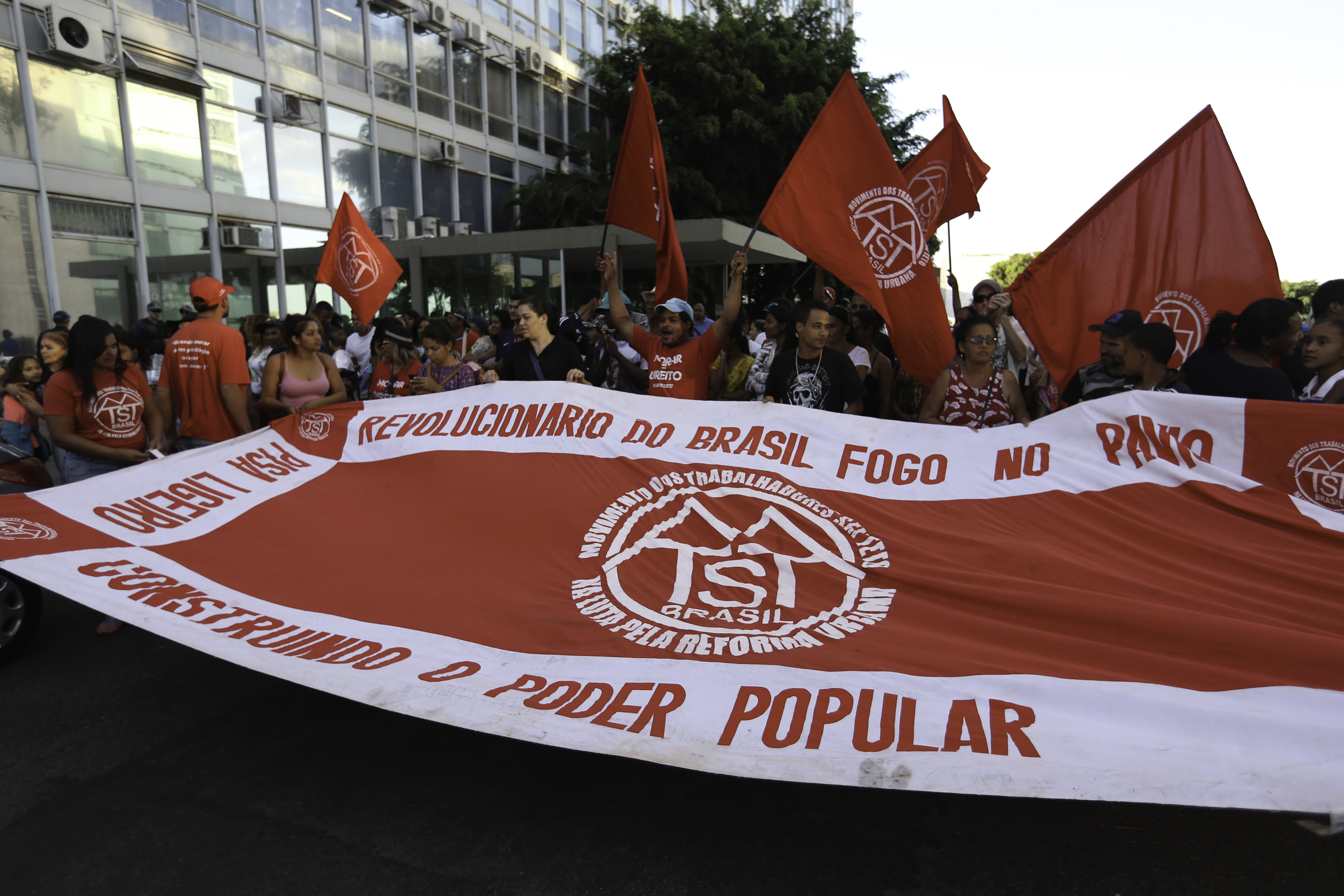 Brasília - Integrantes do Movimento dos Trabalhadores sem Teto, fizeram manifestação contra o ajuste fiscal na entrada do Ministério da Fazenda (Fabio Rodrigues Pozzebom/Agência Brasil)